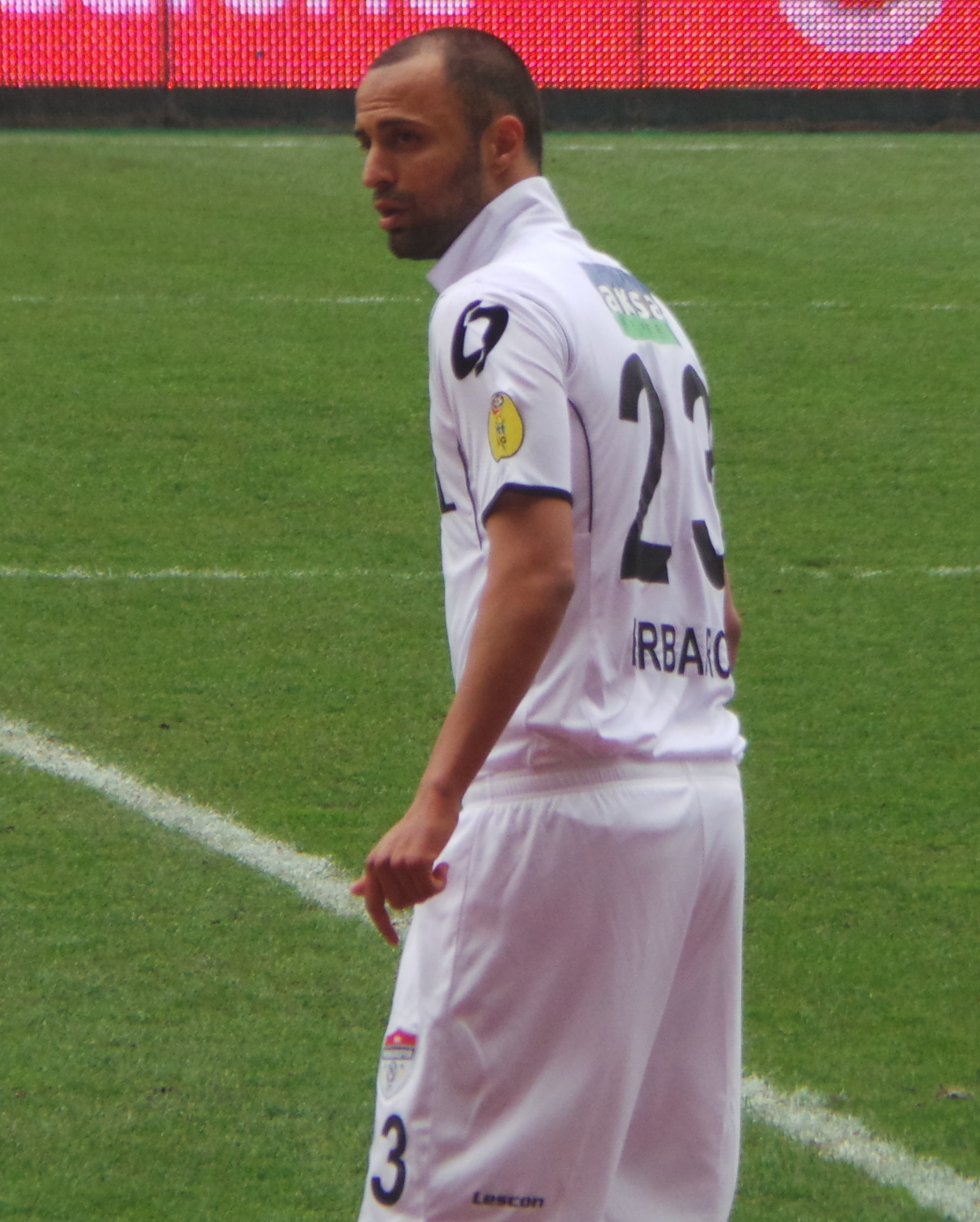 Barbaros Barut